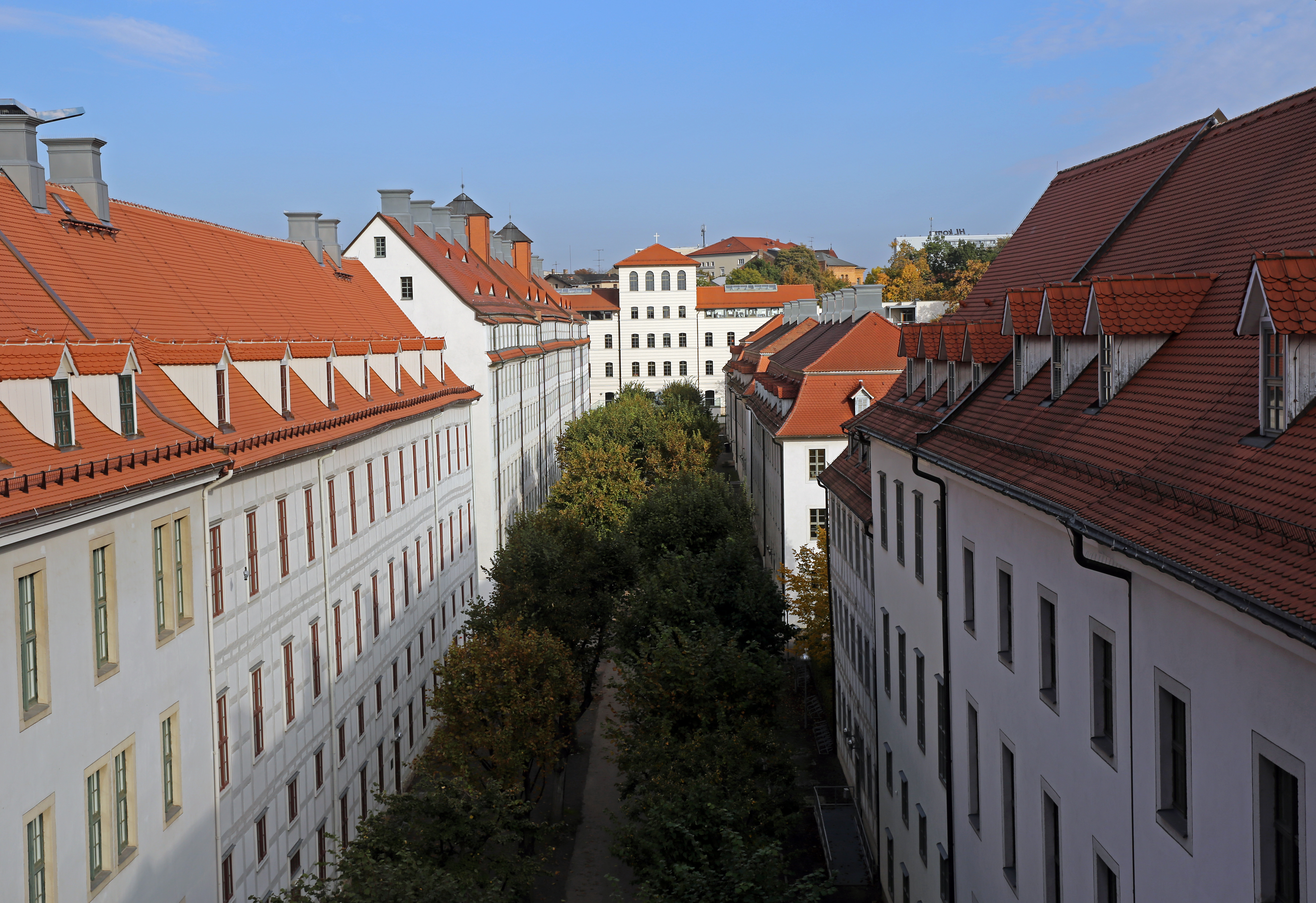 Lindenhof der Franckeschen Stiftungen in Halle/Saale